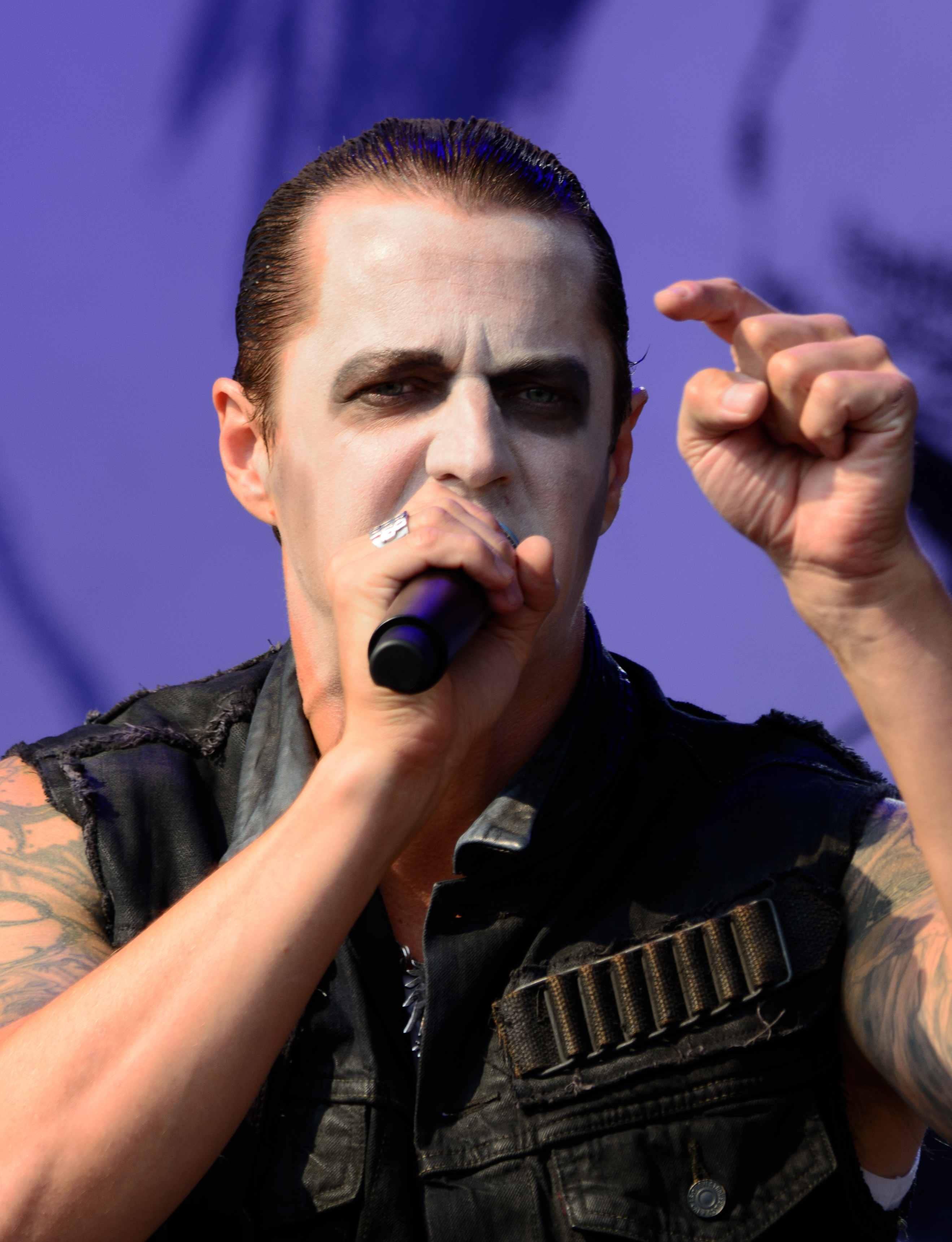 Satyricon beim Elbriot 2018